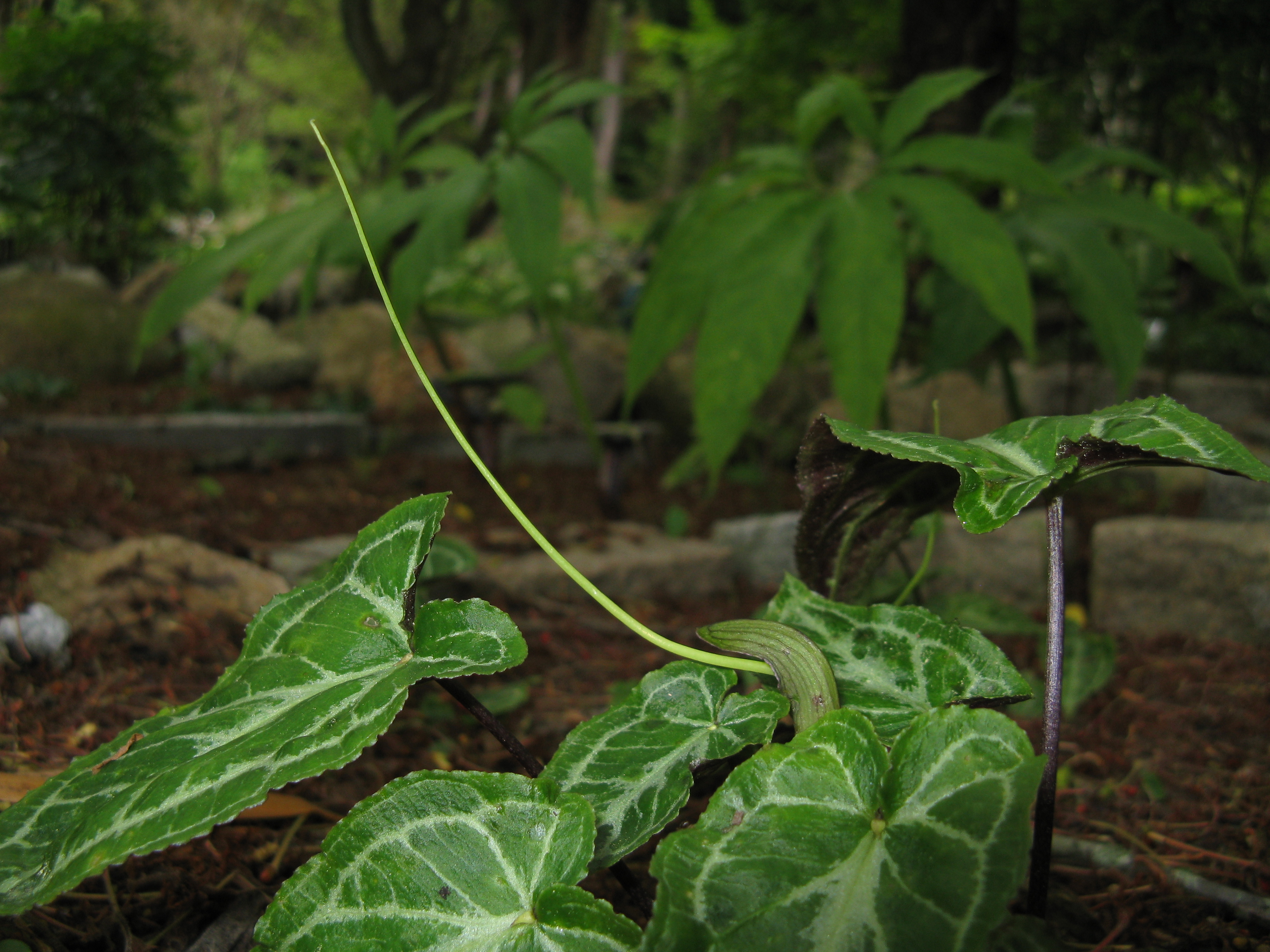 Scientific name Pinellia cordata